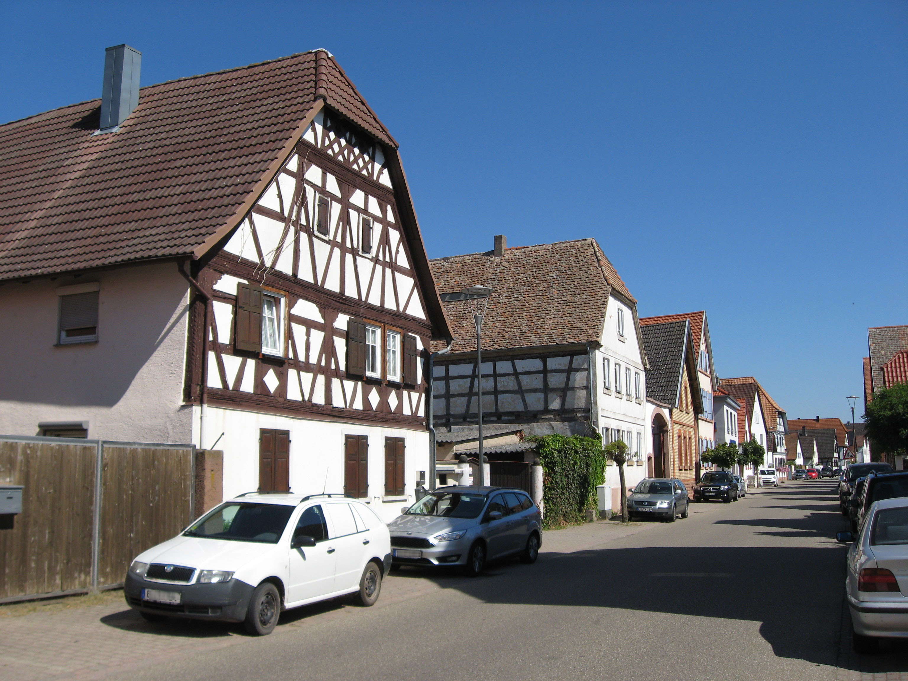 Denkmalzone Hauptstraße 19 ff. in Gommersheim